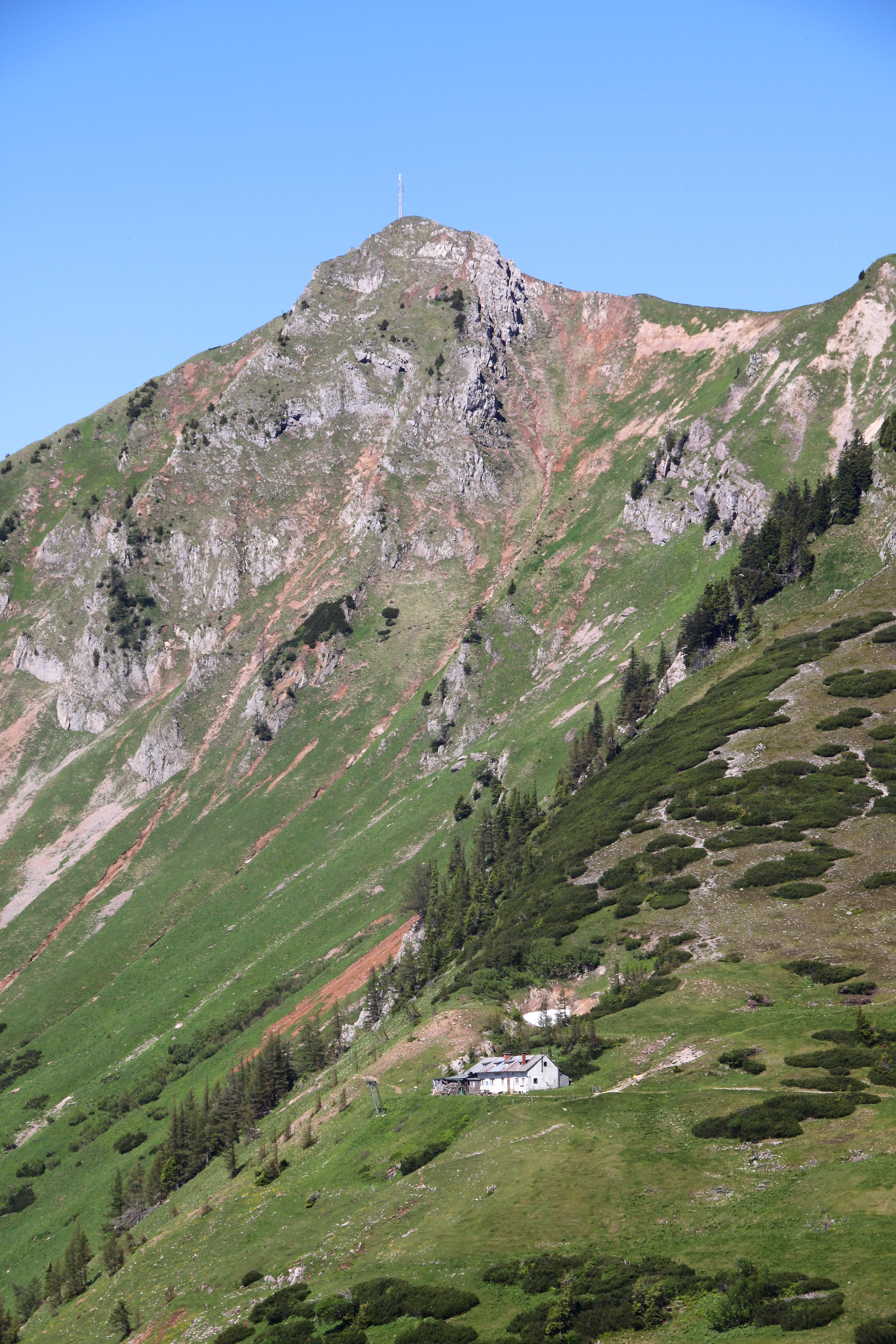 Ostansicht des Polsters, im Vordergrund die Leobner Hütte